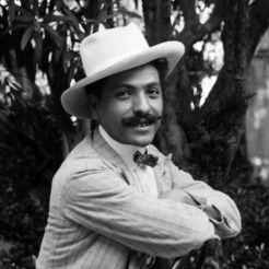 Totò Majorana